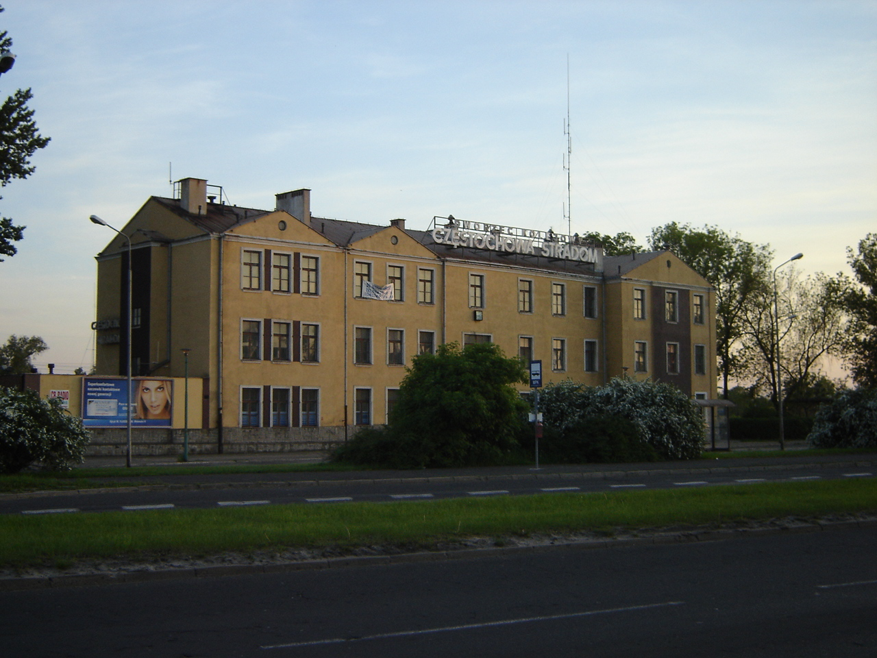 Stacja kolejowa Częstochowa Stradom